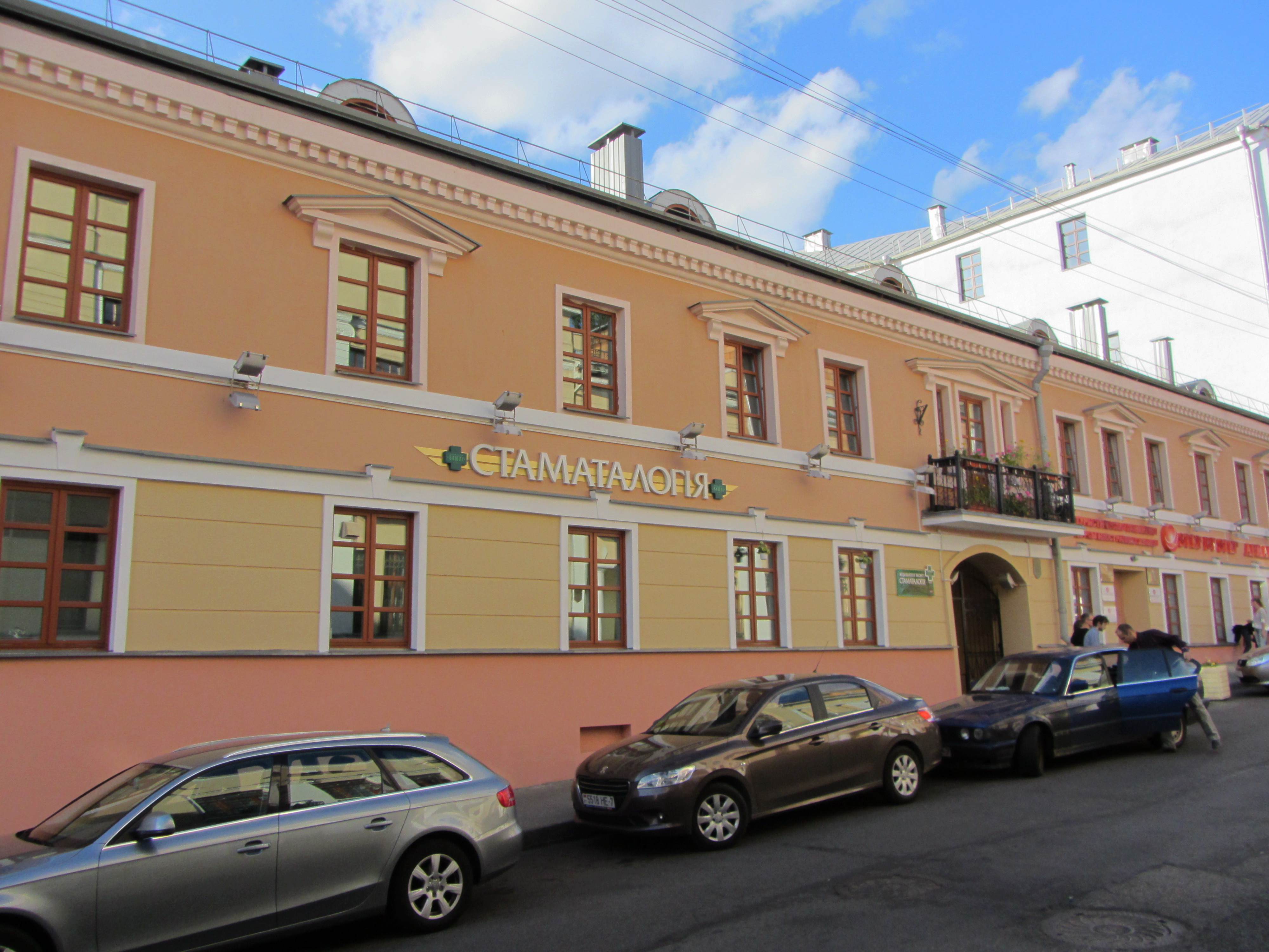 Беларуская (тарашкевіца): Вуліца Рэвалюцыйная, 4